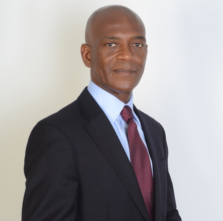 Pr. Mamadou Koulibaly, président de Liberté et Démocratie pour la République (LIDER)